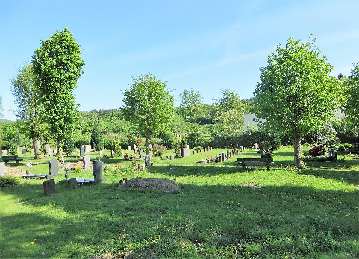 Blick von der Straßburger Straße auf den jüdischen Friedhof in Hagen-Eilpe.